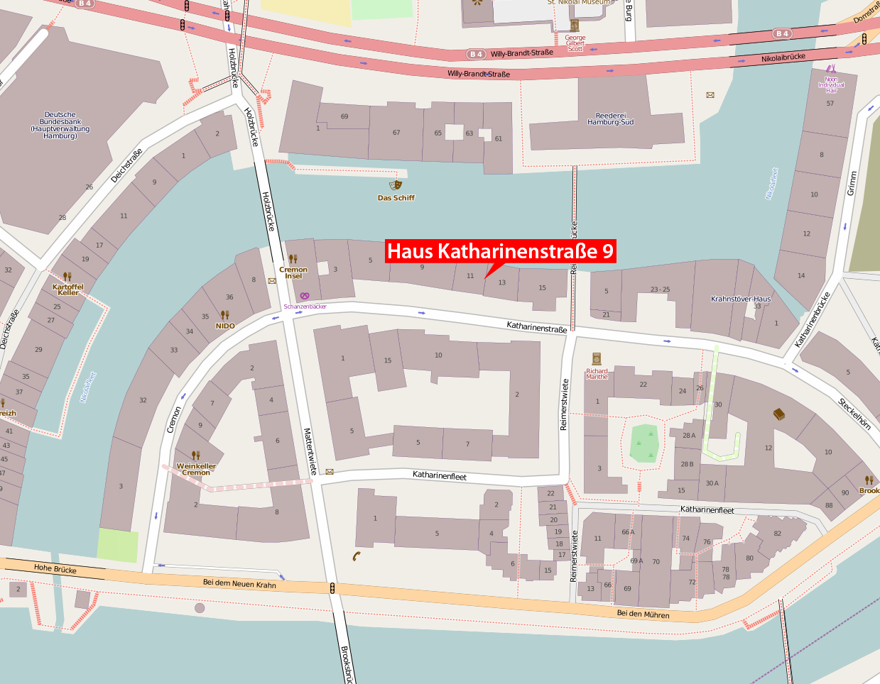 Karte des Hauses Katharinenstraße 9 in Hamburg, Deutschland.